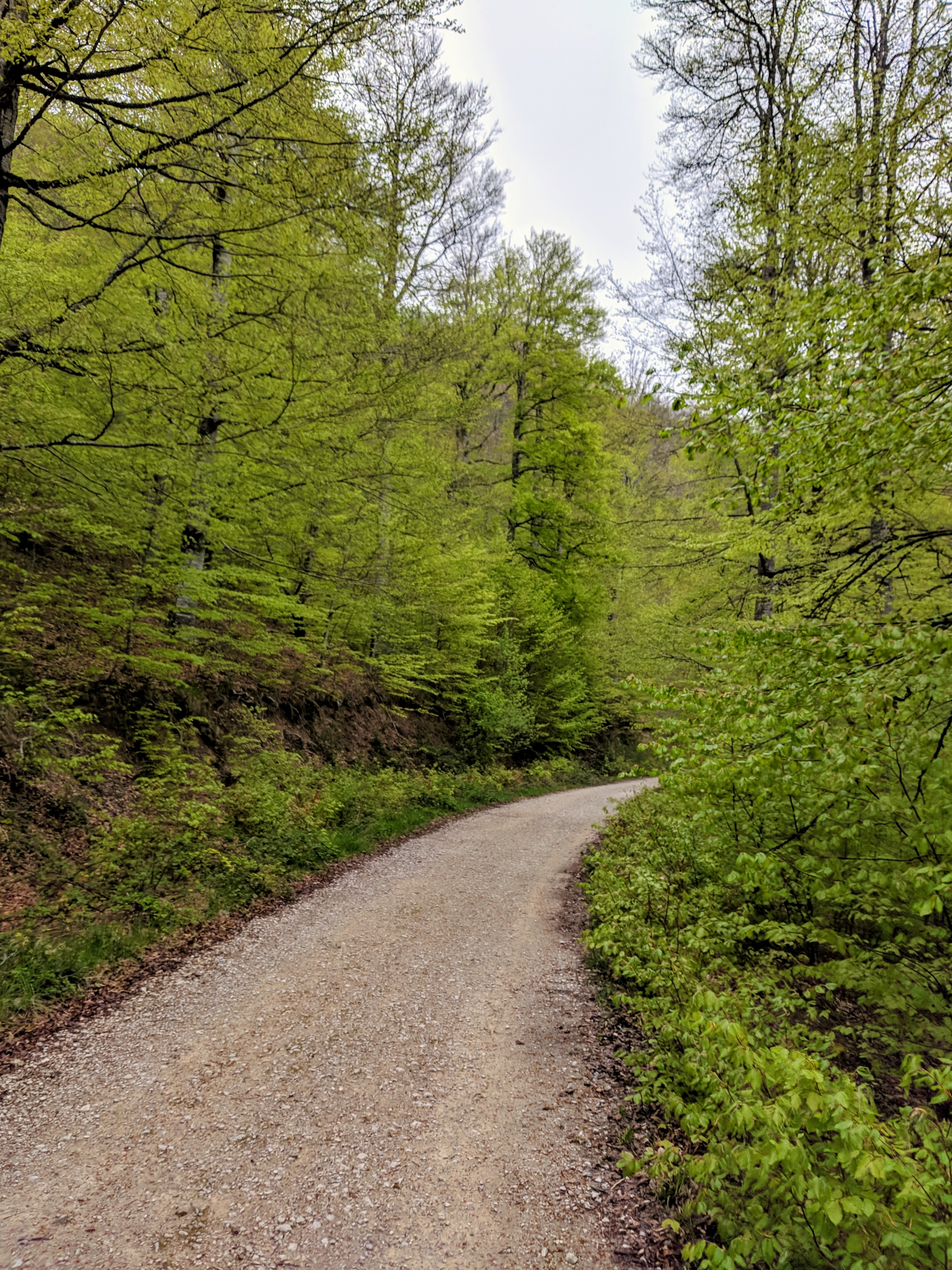 Roncesvalles-Selva de Irati This is a photography of a Special Area of Conservation in Spain with the ID: ES0000126. Natura2000 entry, EEA entry